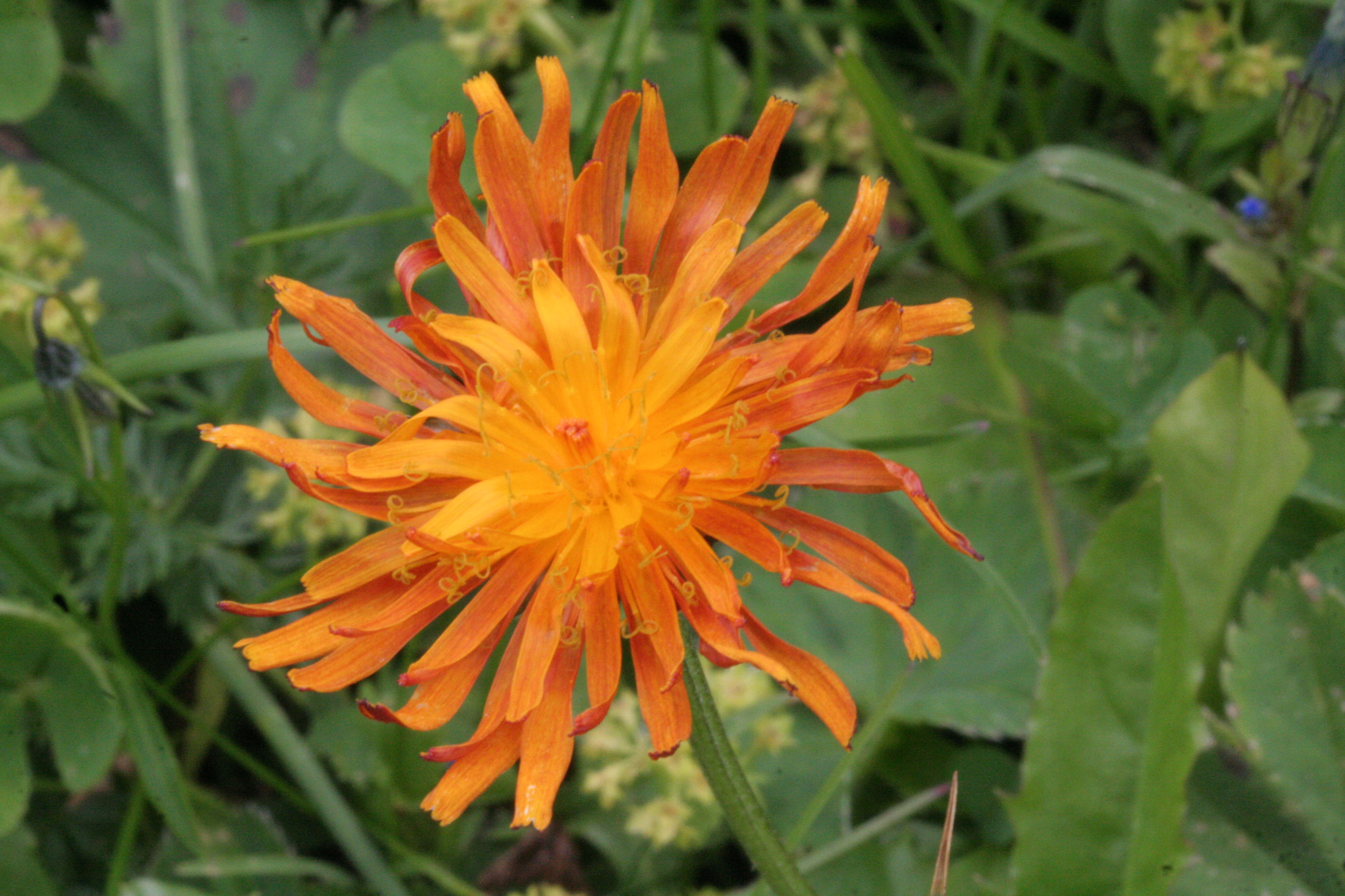 Crepis_aurea (Radichiella aranciata) Località : Passo di Giau, Cortina (BL), 2233 m s.l.m.